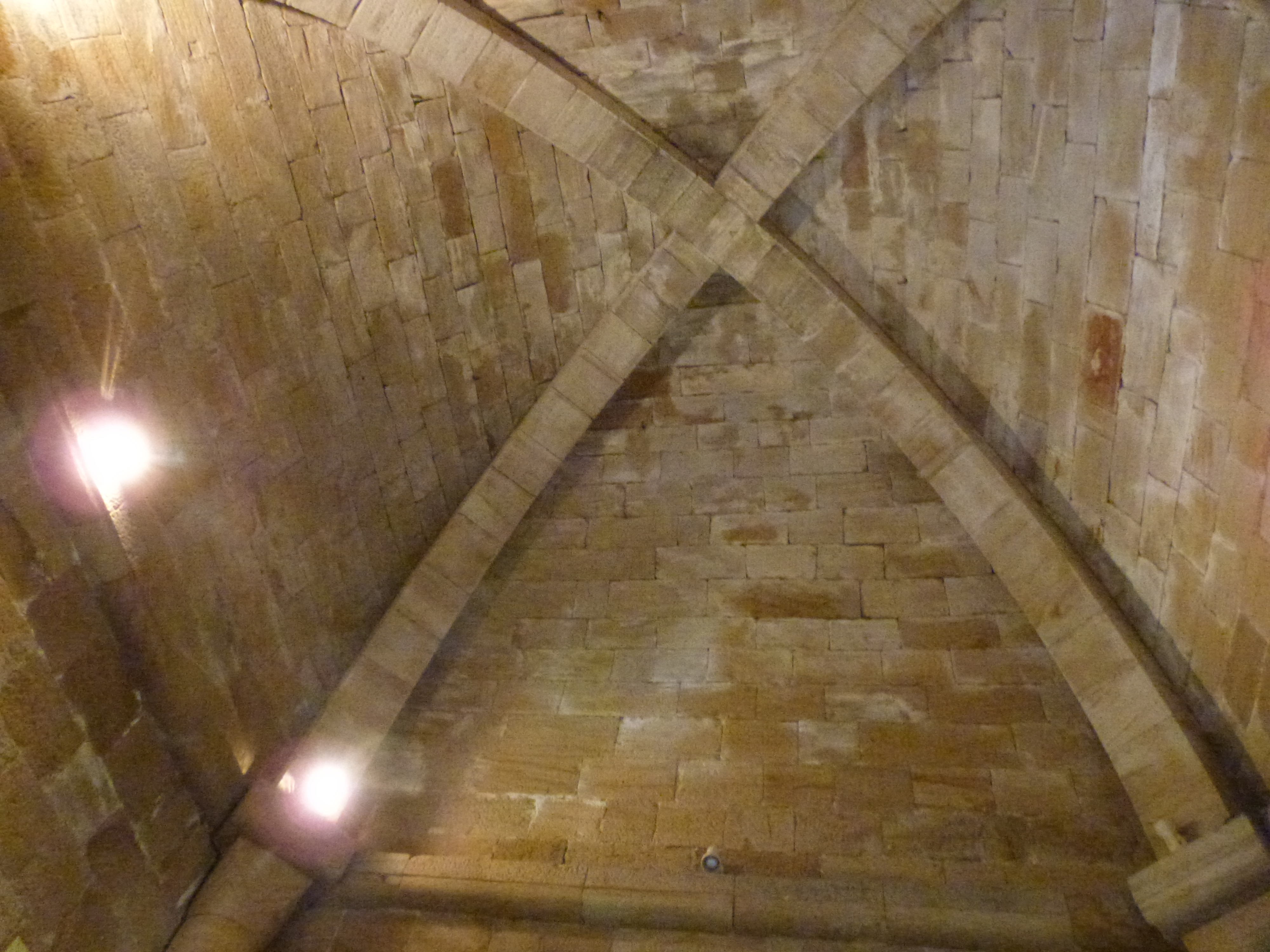 Tour de Sagnes (Inscrit) .